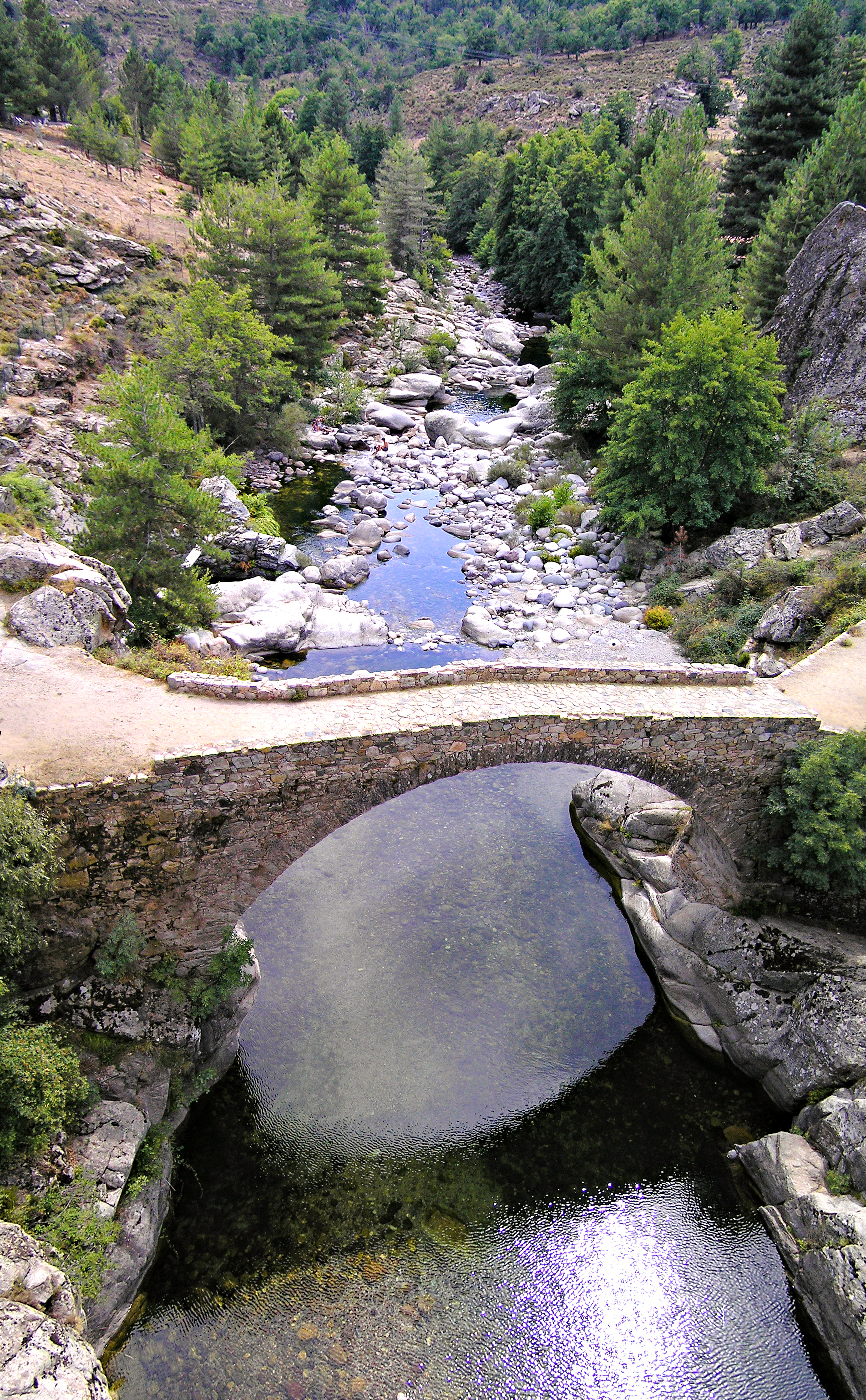 Albertacce (Corsica) - Ponte Altu, pont génois sur le Golo